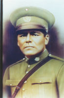 Gráfico del General Heliodoro Charis